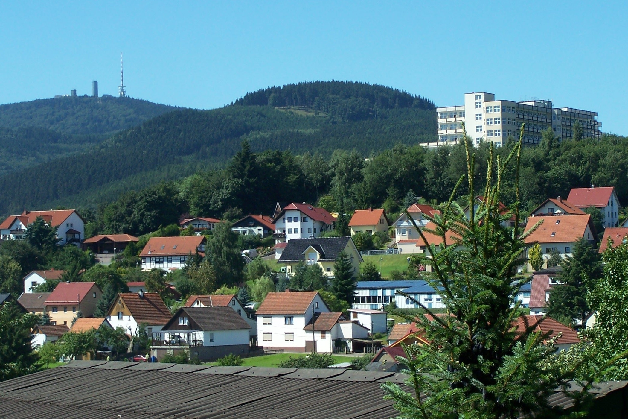 Blick von Osten auf die Siedlung Nonnenberg am Nordrand von Cabarz.